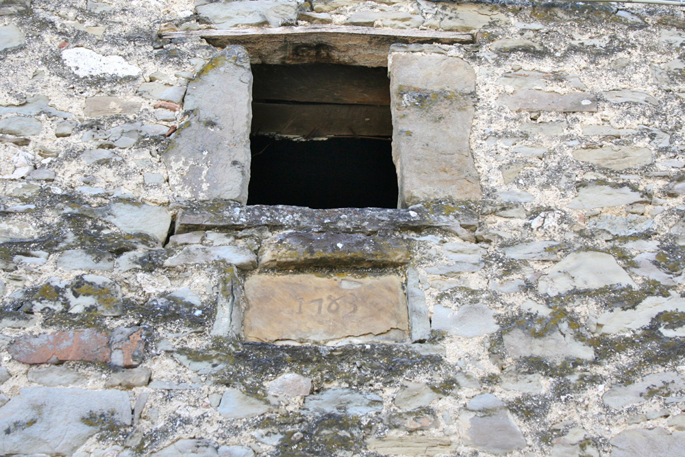 Finestra con data del 1783, interno del borgo di Pietracamela in provincia di Teramo.